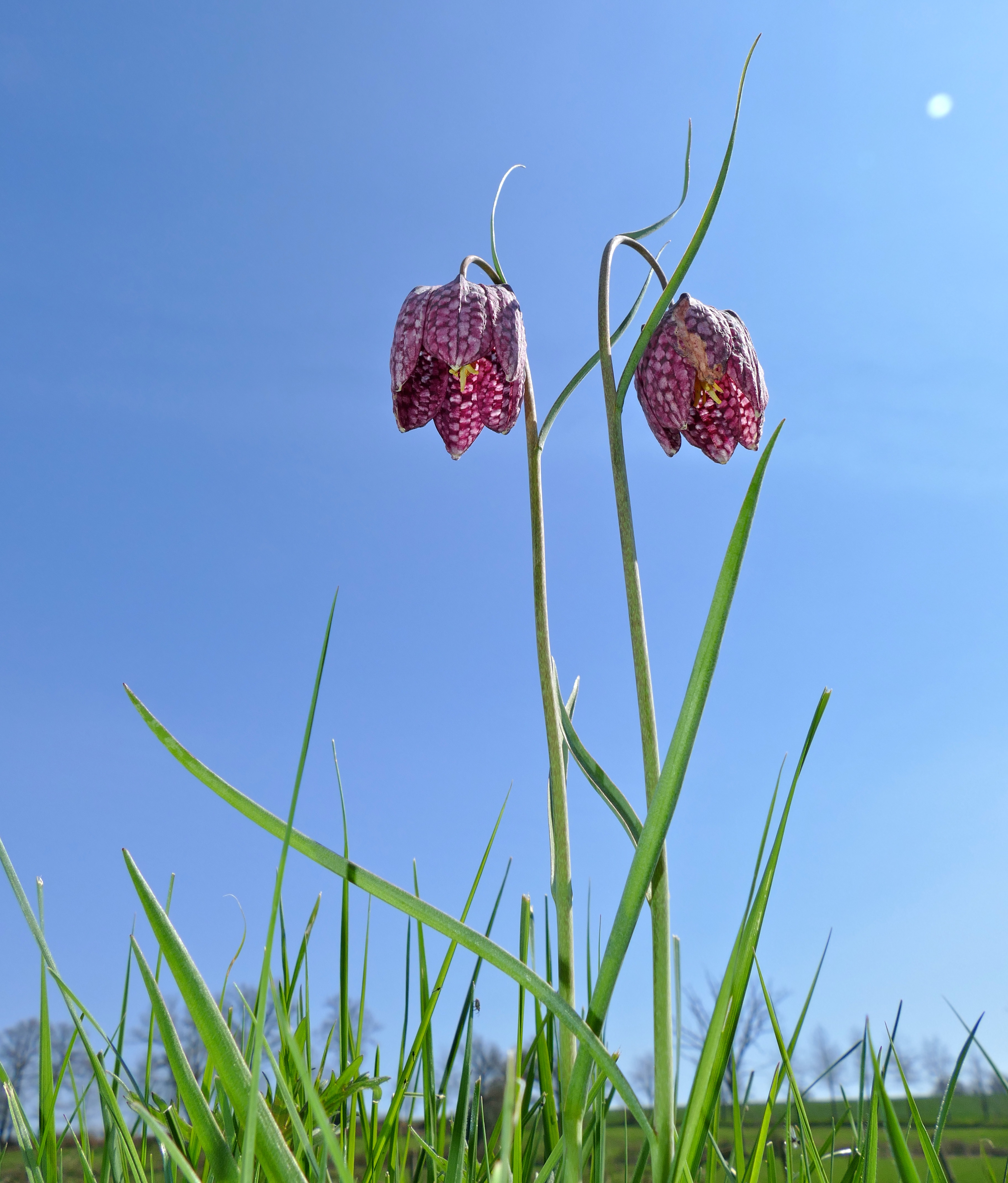 La Noë des Rivières, La Courbe, Orne, FRANCE